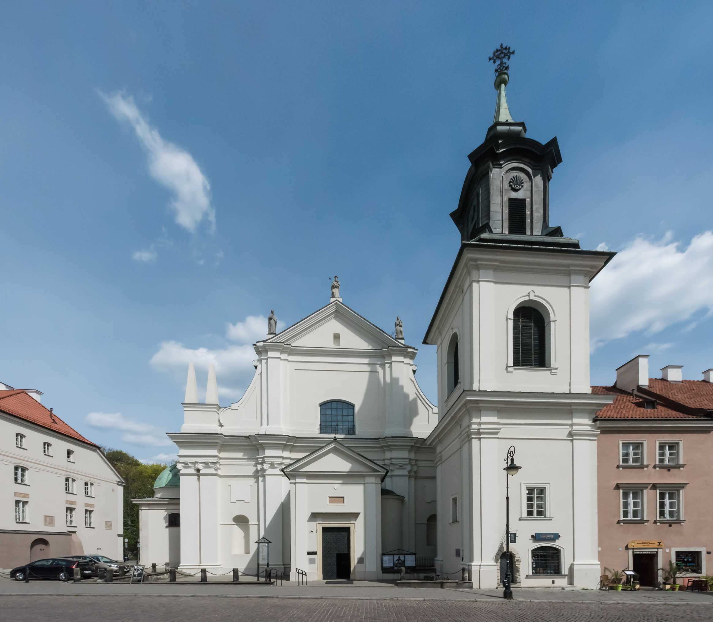 Kościół św. Jacka przy ul. Freta w Warszawie